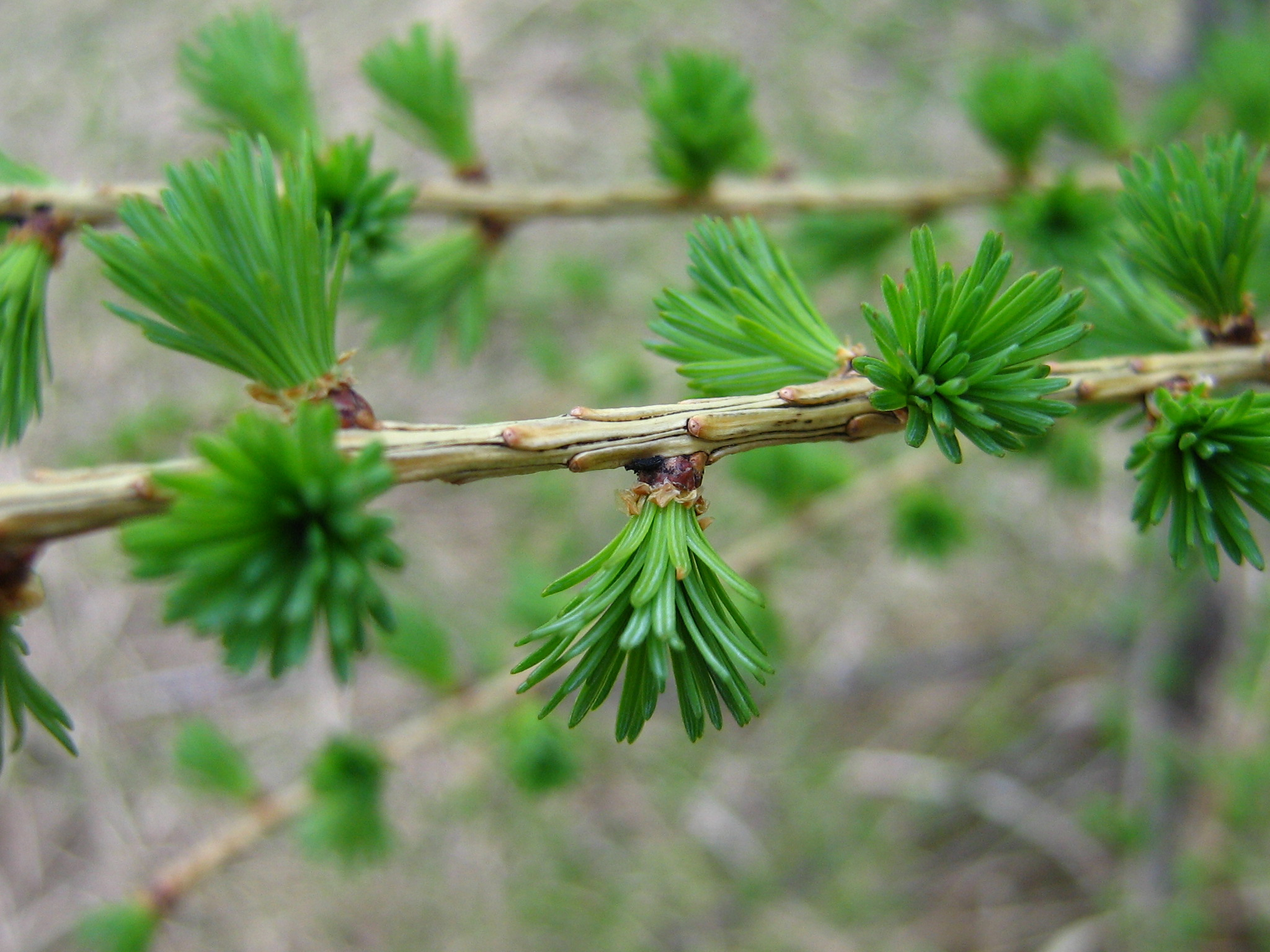 Europäische Lärche (Nadeln) (Larix decidua, Nadelansatz) Fotografiert in Steyr/Damberg, Oberösterreich